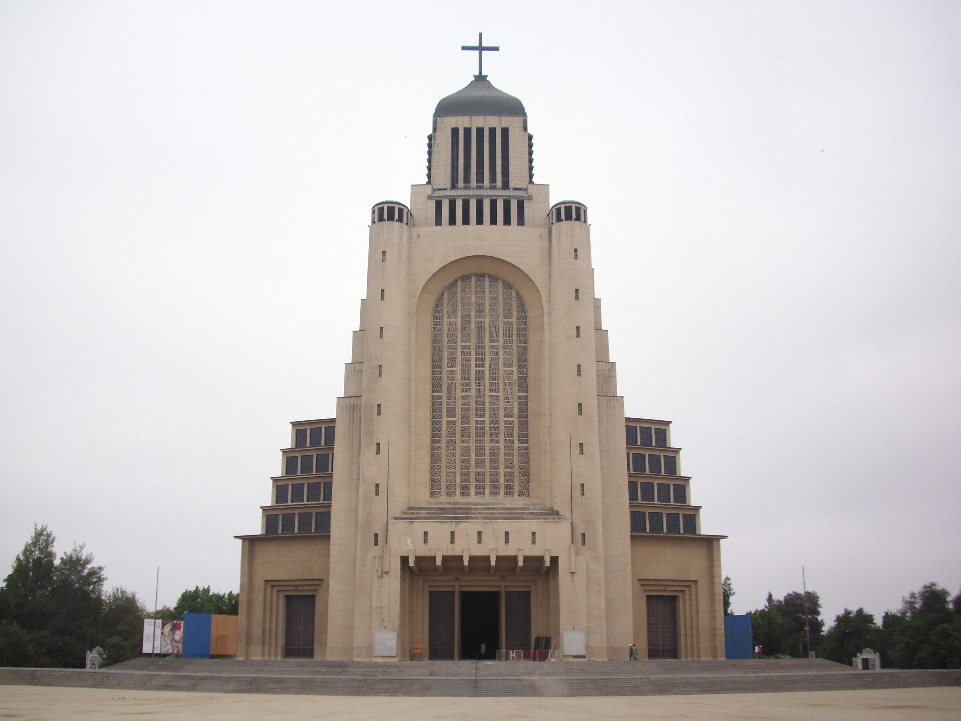 La fachada del Templo Votivo de Maipú, diseñado por el arquitecto chileno Juan Martínez Gutiérrez.